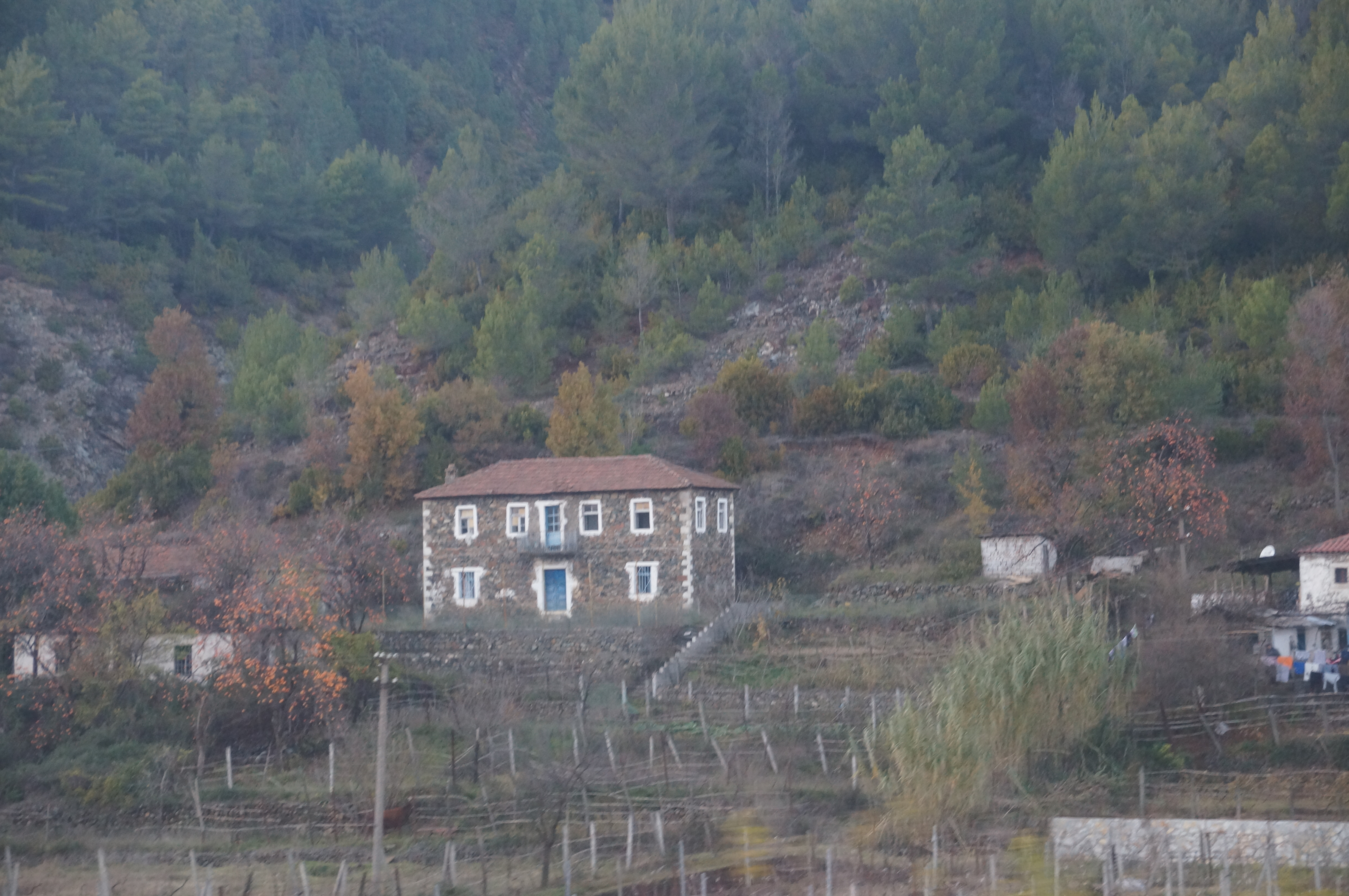 Old Kulla in Mirëdita, Albania